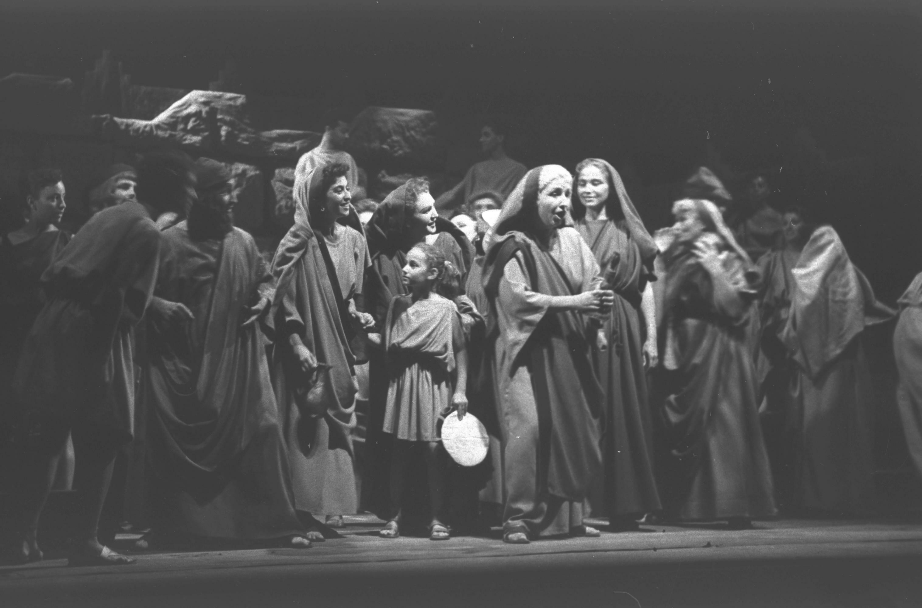 סצינה מתוך הופעת הבכורה של האופרה "אלכסנדרה" על בימת האופרה הישראלית